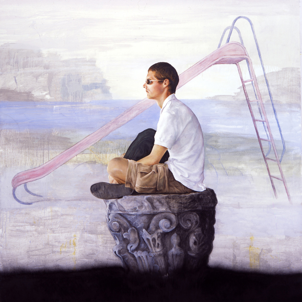 Cuadro perteneciente a la exposición Un cuento chino de Juan Vida